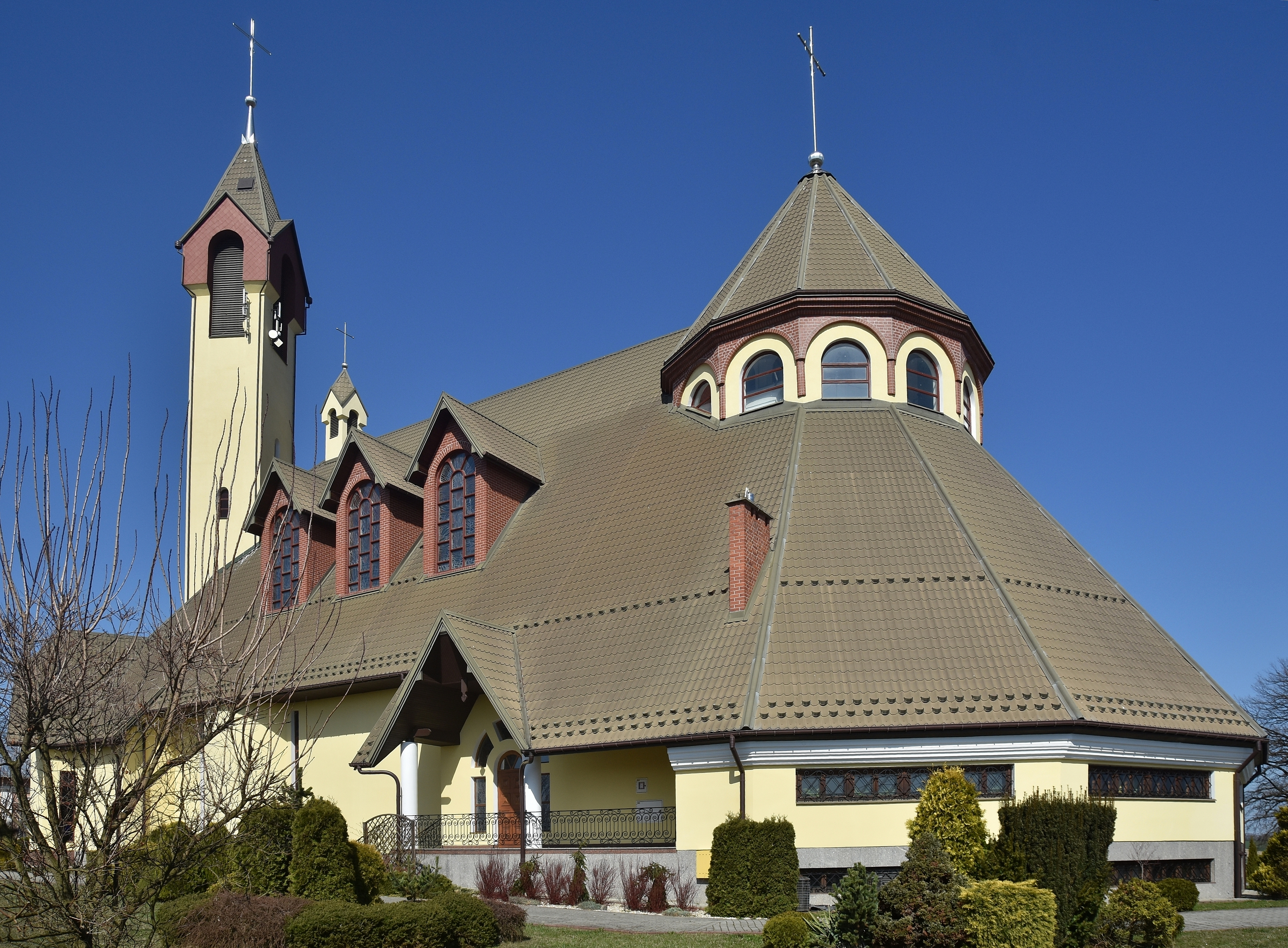 wieś Szebnie